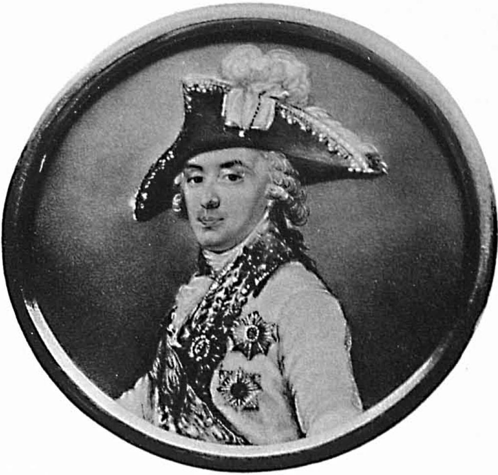 Светлейший князь Платон Александрович Зубов (1767-1822)